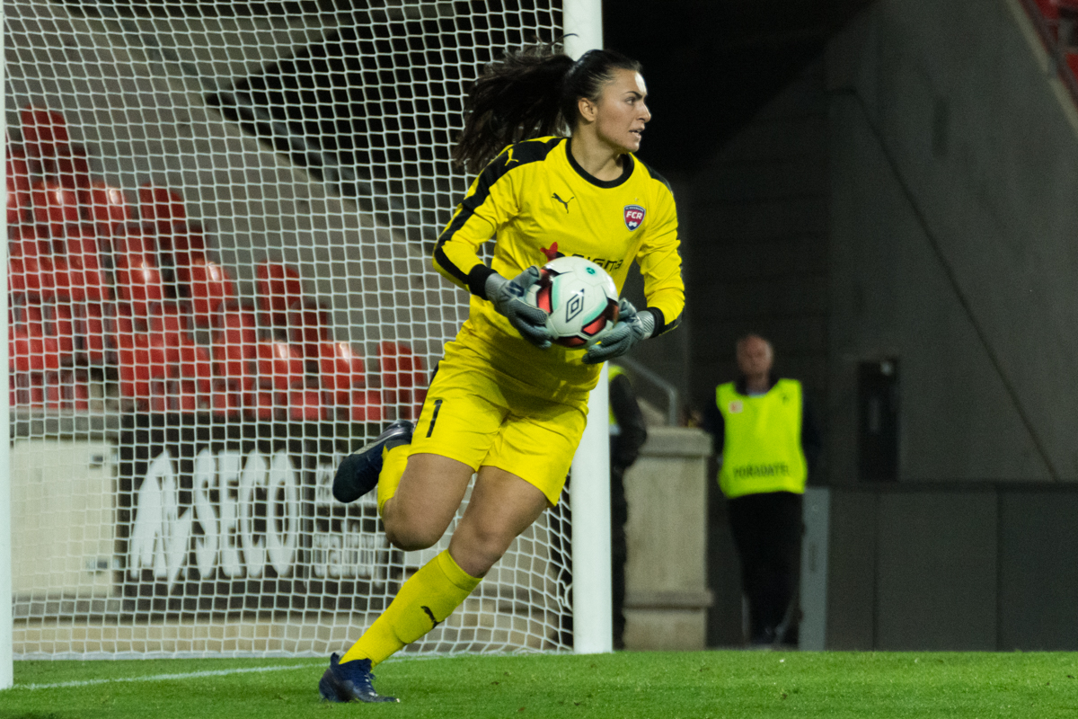 Zećira Mušović vs Slavia PRaha on 1 November 2018